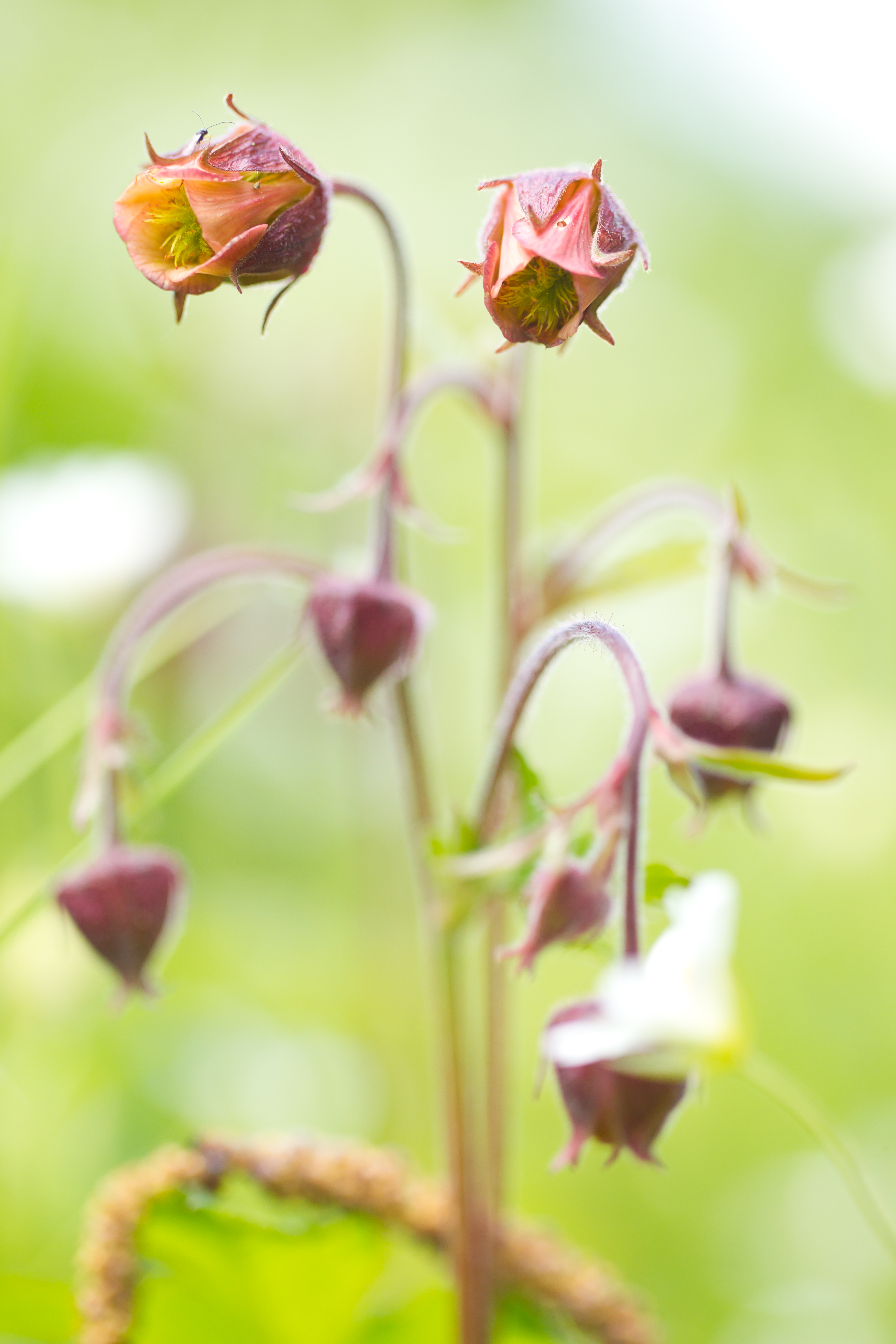 Bachnelkenwurz (Geum rivale) im Landschaftsschutzgebiet „Teinachtal mit Seitentälern“ (LSG 2.35.053)